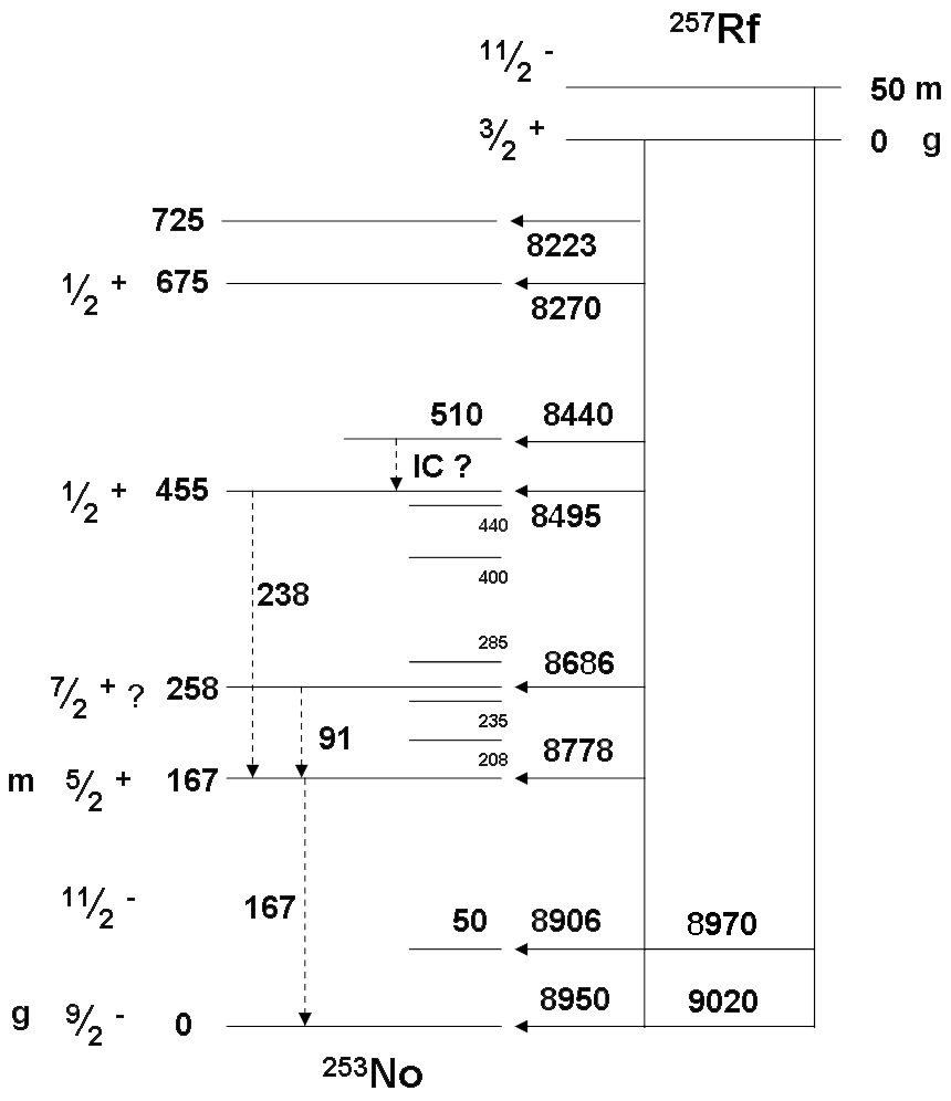 روند تجزیه رادرفردیم-۲۵۷